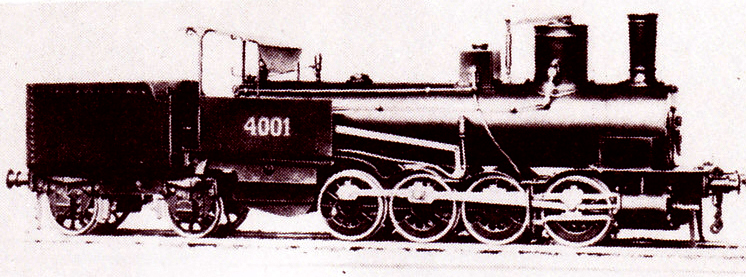 Locomotiva 4001 della Rete Mediterranea, poi FS Gr. 410